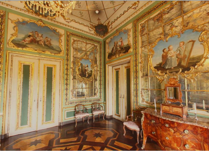 Sala do Toucador do Palácio